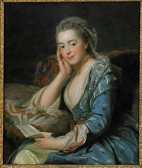 Comtesse de Bonneval, née Biron (Judith-Charlotte, married 07/05/1717 Claude Alexandre de Bonneval.)